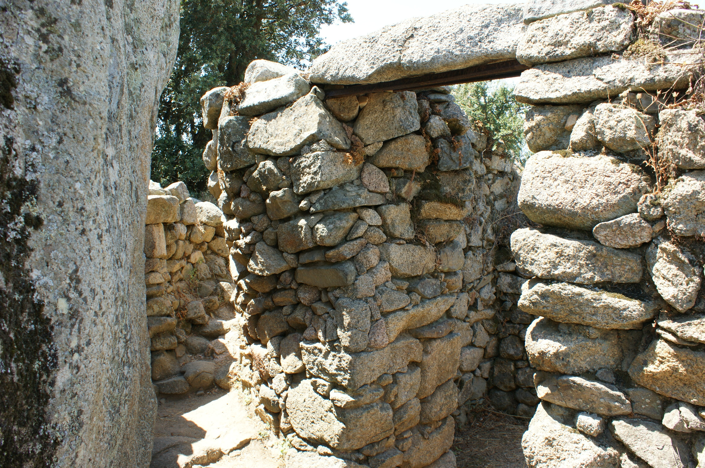 Locuințe vechi de 8000 de ani din complexul de la Filitosa.